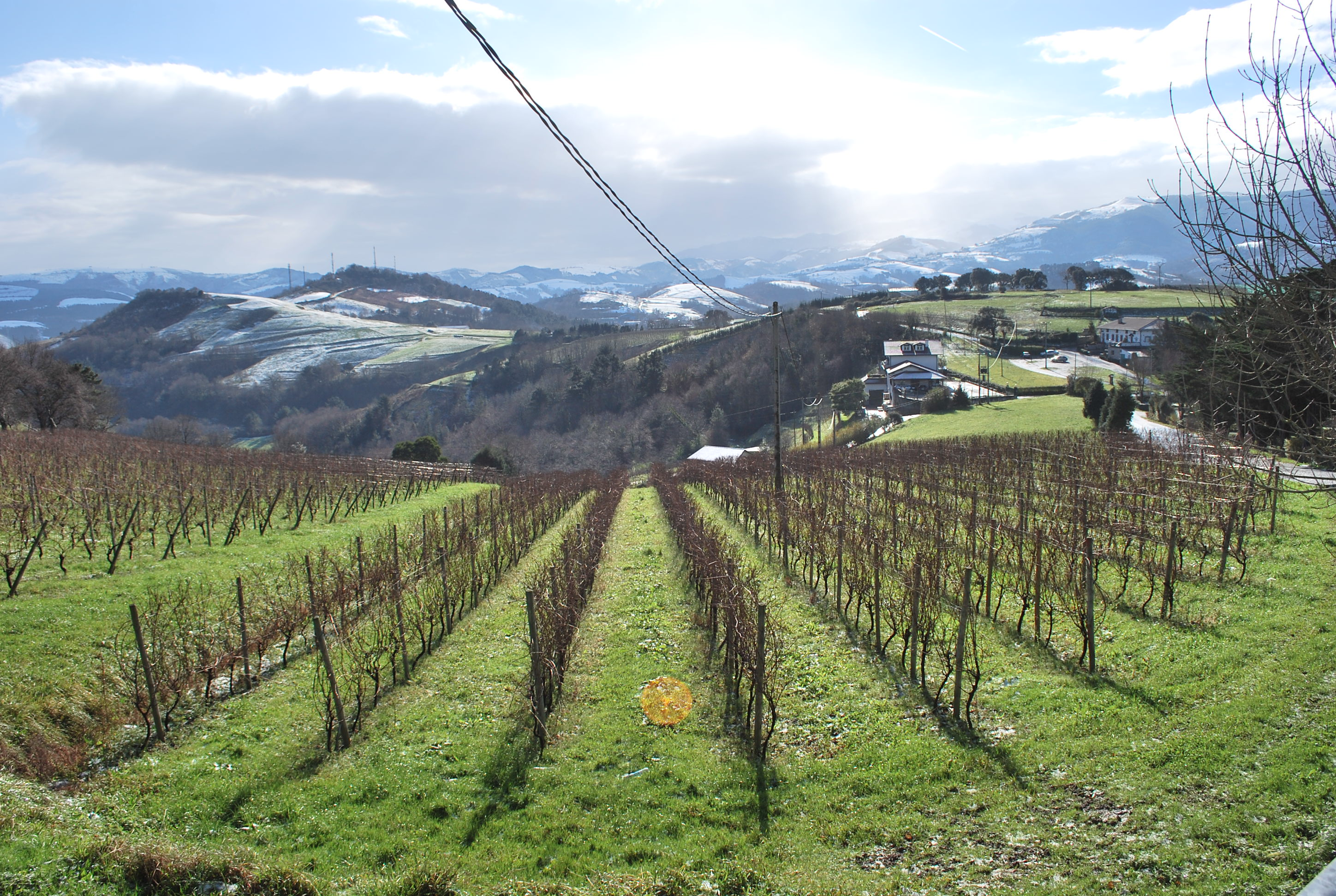 Vue partielle des vignes sur les pentes du camping à Zarautz (Guipuscoa).